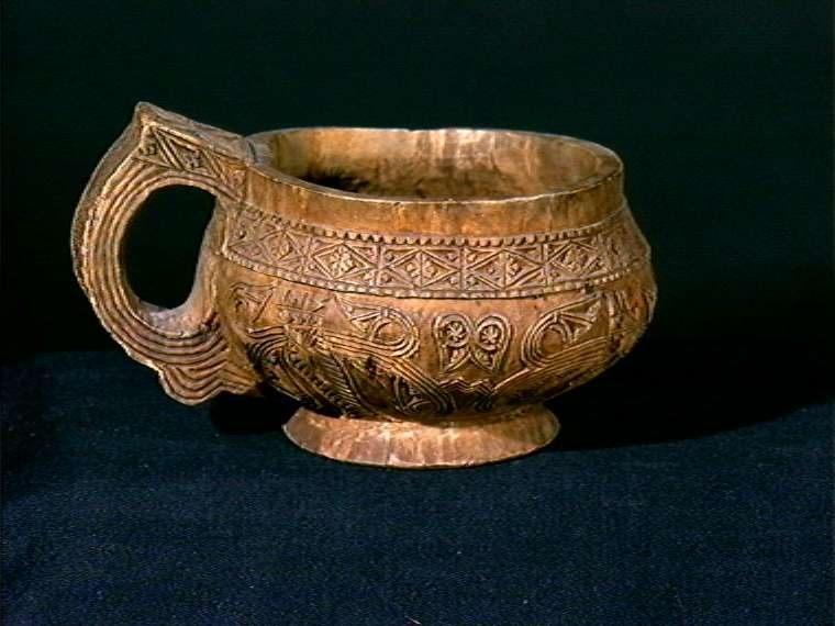 Einskilskopp datert 1777, fra Valle i Setesdal, Norge. Høyde 7,5 cm. Norsk Folkemuseum NF.1911-0673